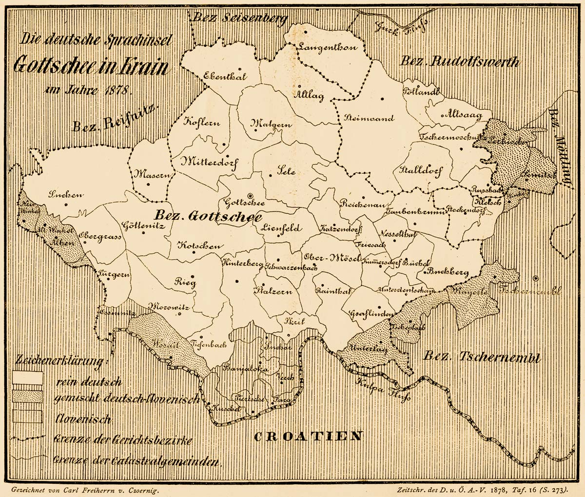 Aus: Zeitschr. d. Deutschen u. Österreichischen Alpenvereins. Jg. 1878, S.273 :Kategorie:Slowenien